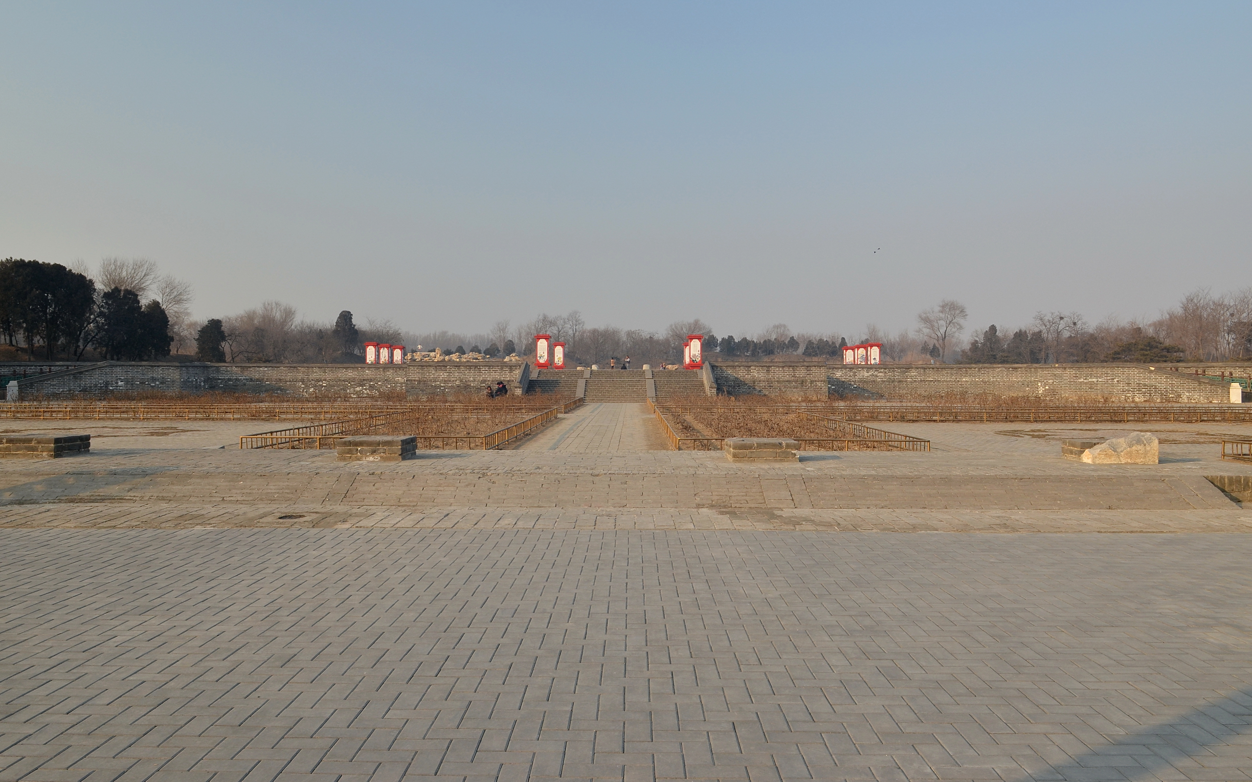 含经堂遗址宫门前以及南牌楼遗址